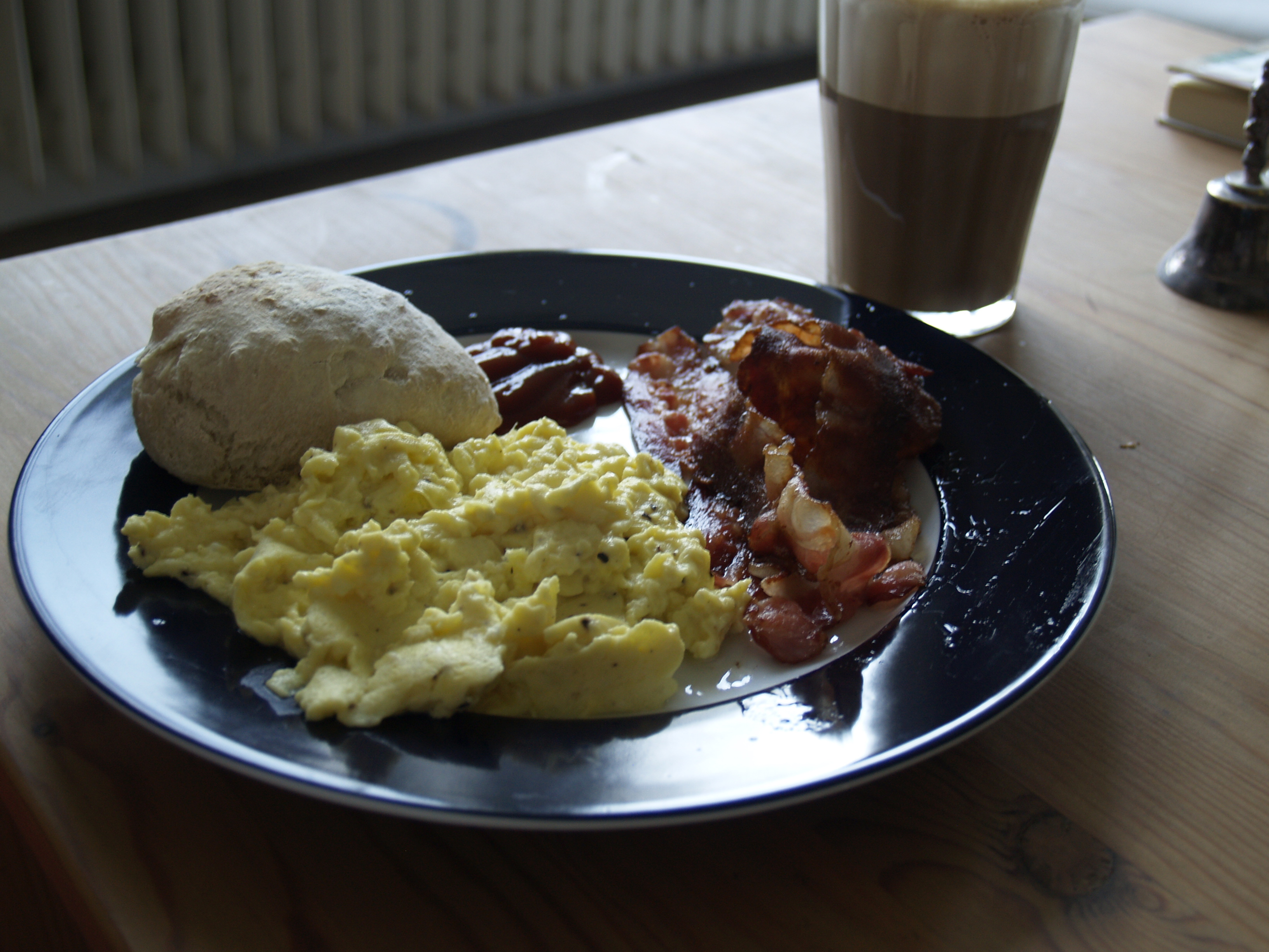 Røræg, bacon, ciabatta og caffe latte